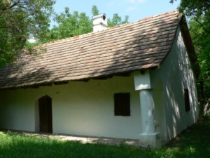 Deák-pince, Felsőnyék